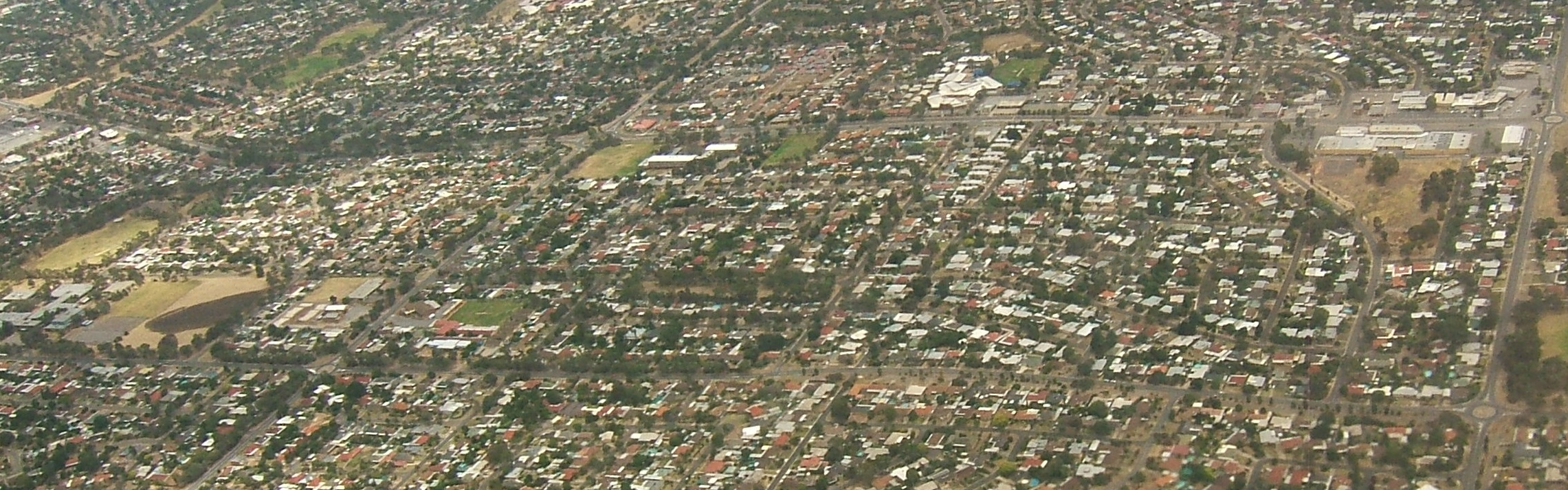 Para Vista in Adelaide